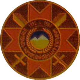 1992-1994 Մարտական գործողությունների մասնակից